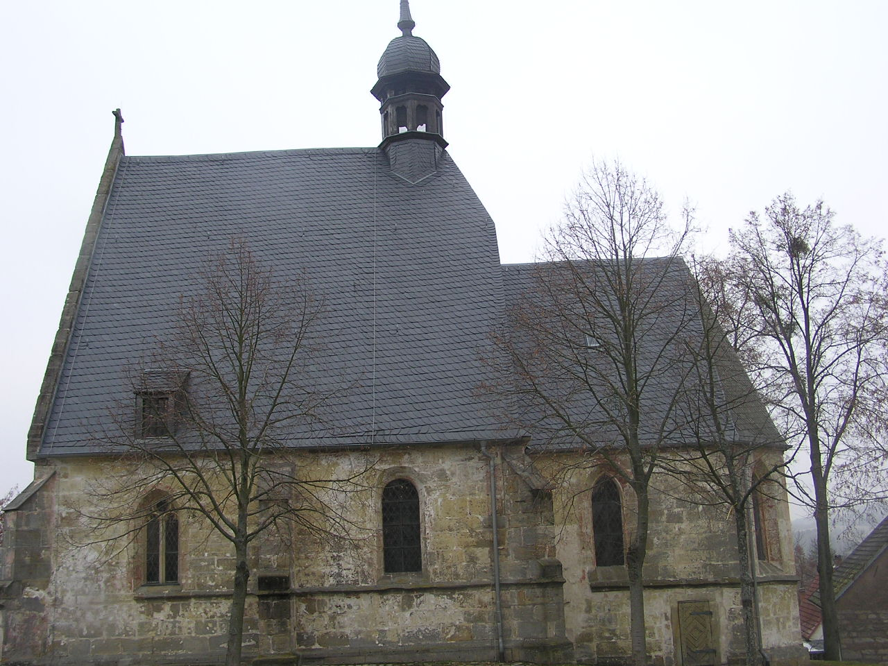 Baunach, Magdalenenkapelle